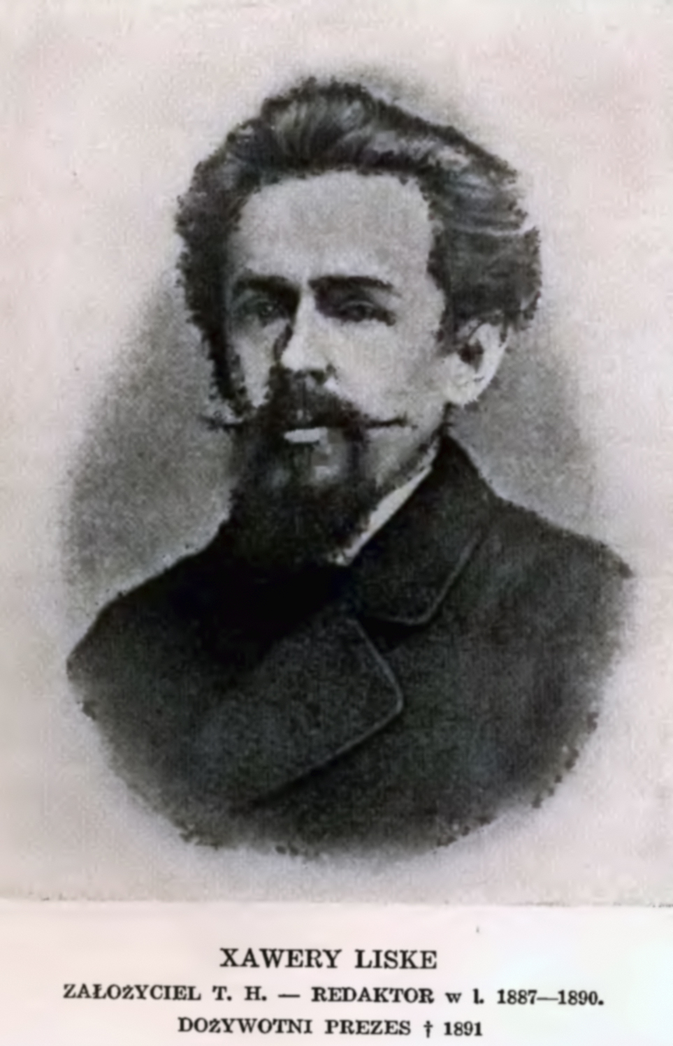 Ksawery Liske (ur. 1838, zm. 1891) – polski historyk, twórca lwowskiej szkoły historycznej, założyciel oraz pierwszy prezes Polskiego Towarzystwa Historycznego.